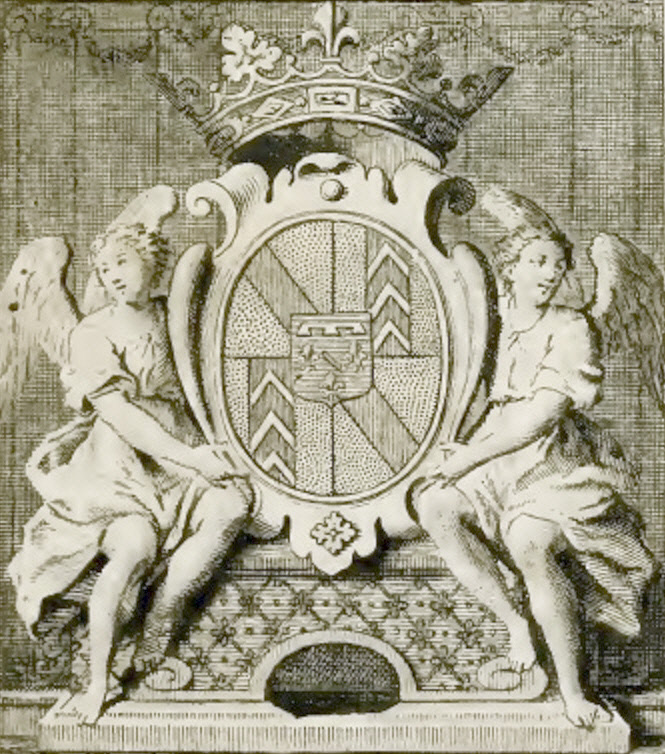 Exlibris von Charles d'Orléans de Rothelin (l’Abbé de Rothelin), hier aus dem Katalog zur Versteigerung seiner Bibliothek. Das Wappen zeigt in Feld 1 und 4 den roten Schrägbalken in goldenem Feld des Hauses Hachberg-Sausenberg und in den Feldern 2 und 3 ein Derivat des Wappens des Hauses Neuenburg mit dem roten Pfahl im goldenen Feld und den silbernen Sparren (wie es im Haus Orléans-Longueville geführt wurde). Das Herzschild zeigt ein Derivat des Wappens des Hauses Orléans mit den silbernen Lilien im blauen Feld.